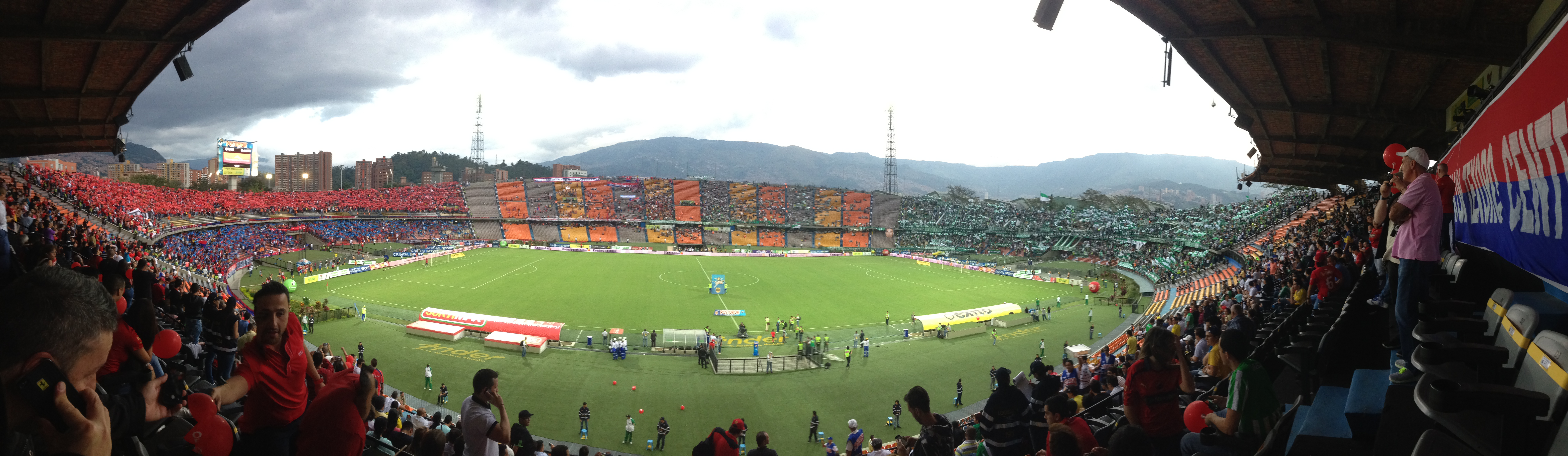 Panoramica Independiente Medellin Vs Atletico Nacional